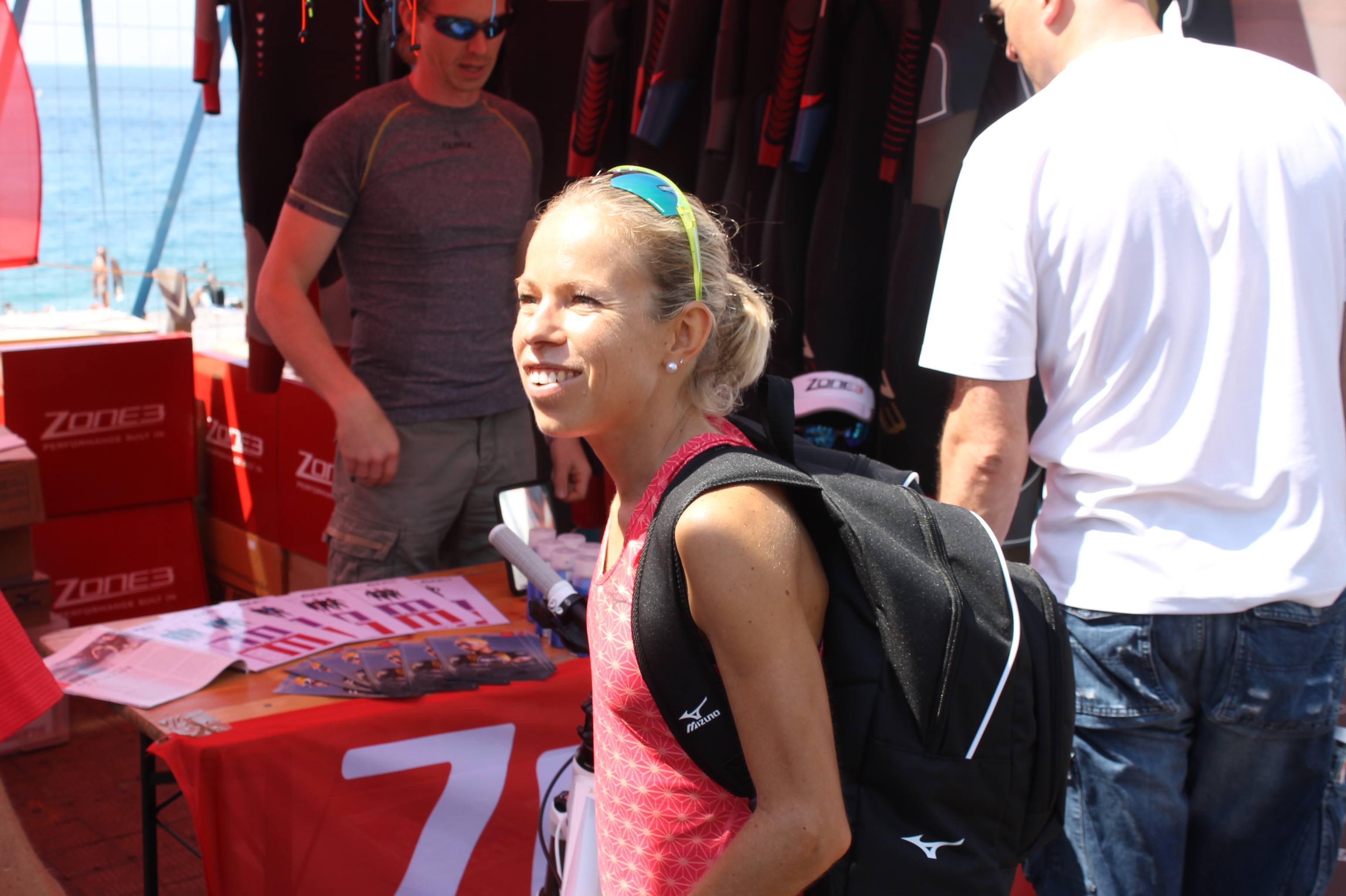 Ironman France . Nice 2015